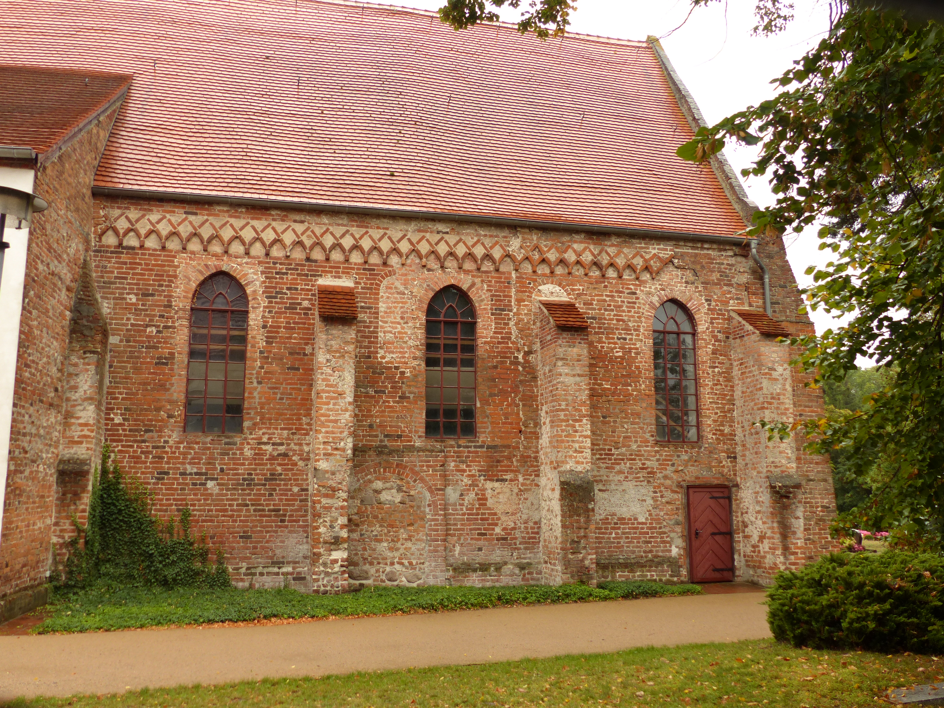 Schiff der evangelischen Kirche in Brandenburg-Plaue, von Norden gesehen